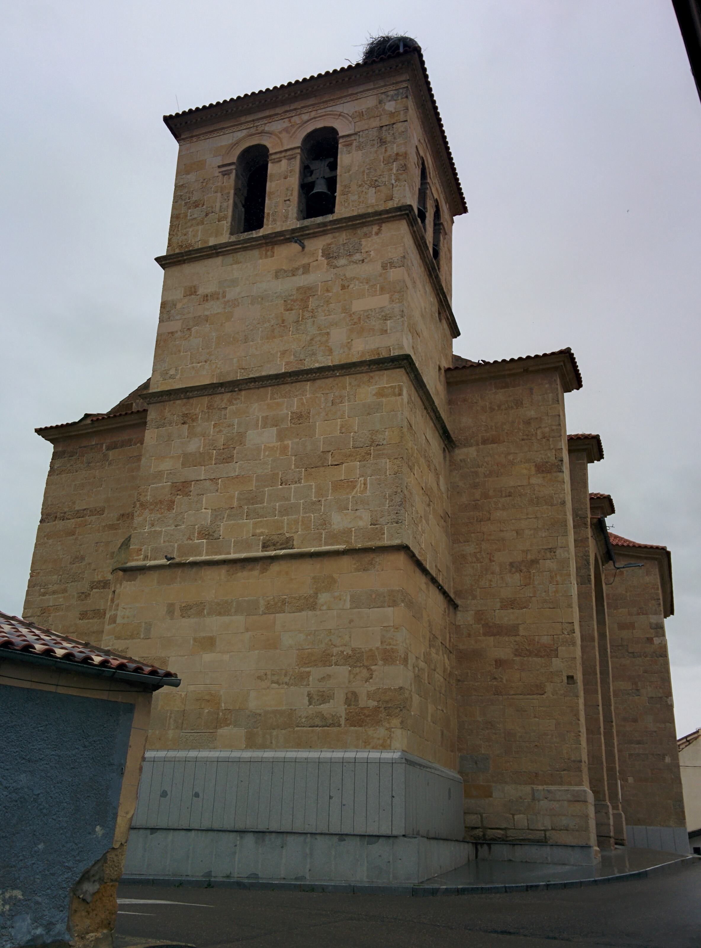 Iglesia de San Silvestre, en Villares de la Reina (Salamanca, España).